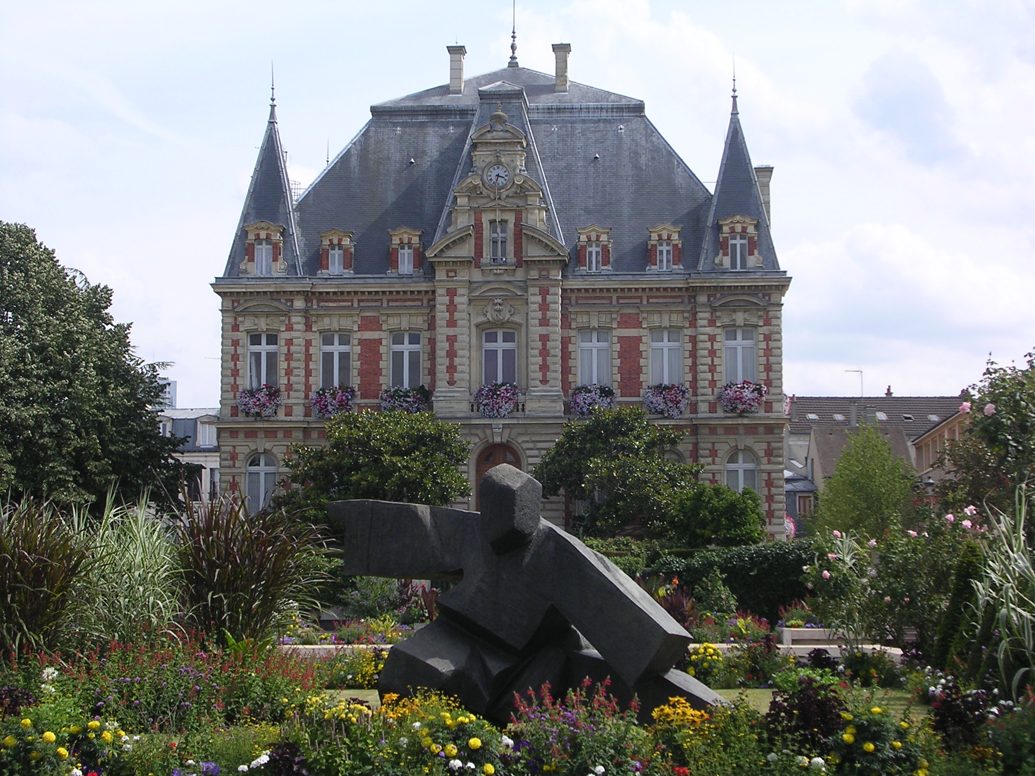 Description: Photo de la mairie de Rueil-Malmaison (prise le 12 août 2005) Licence: GFDL